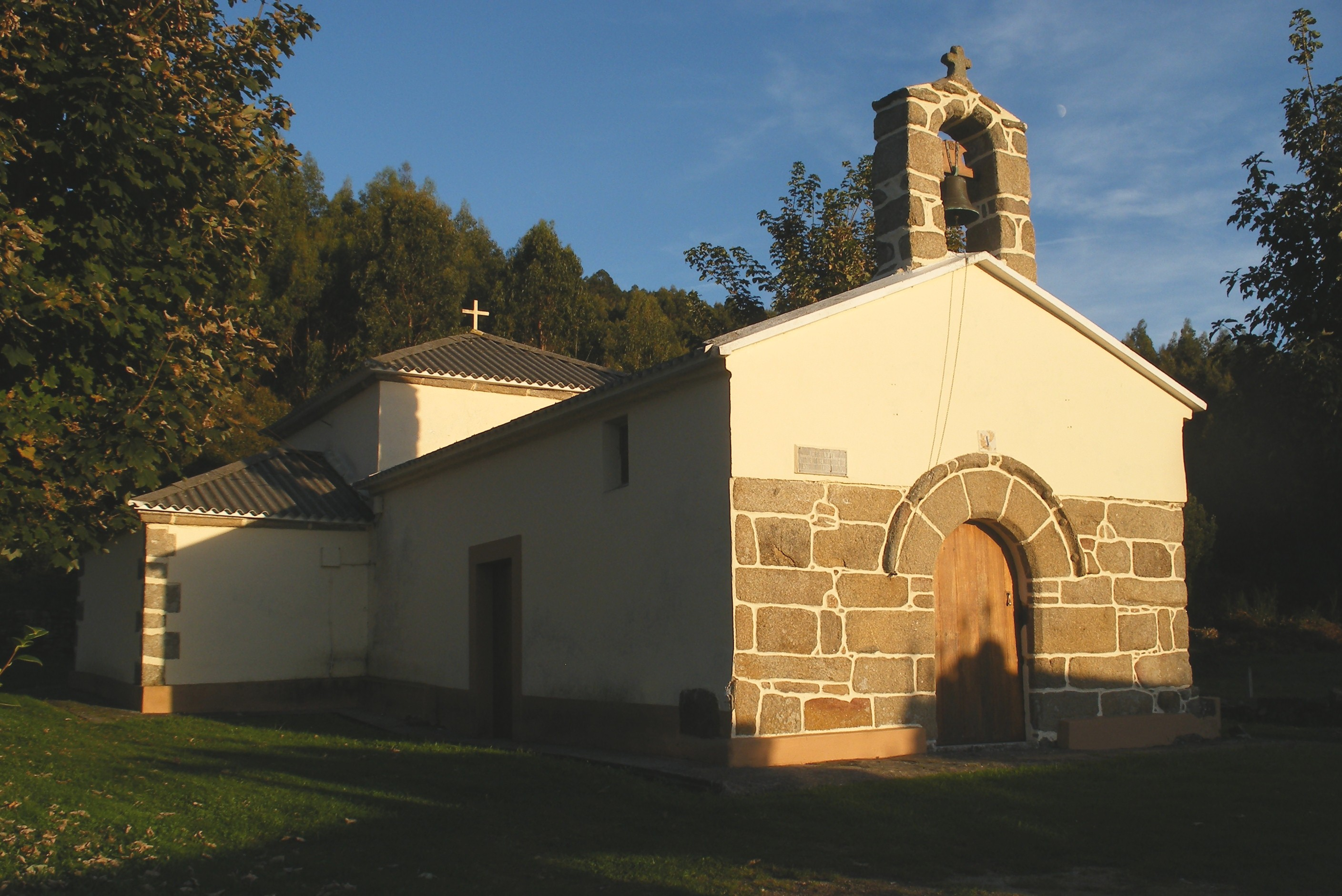 Capela de San Pedro en Marmancón, Ferrol